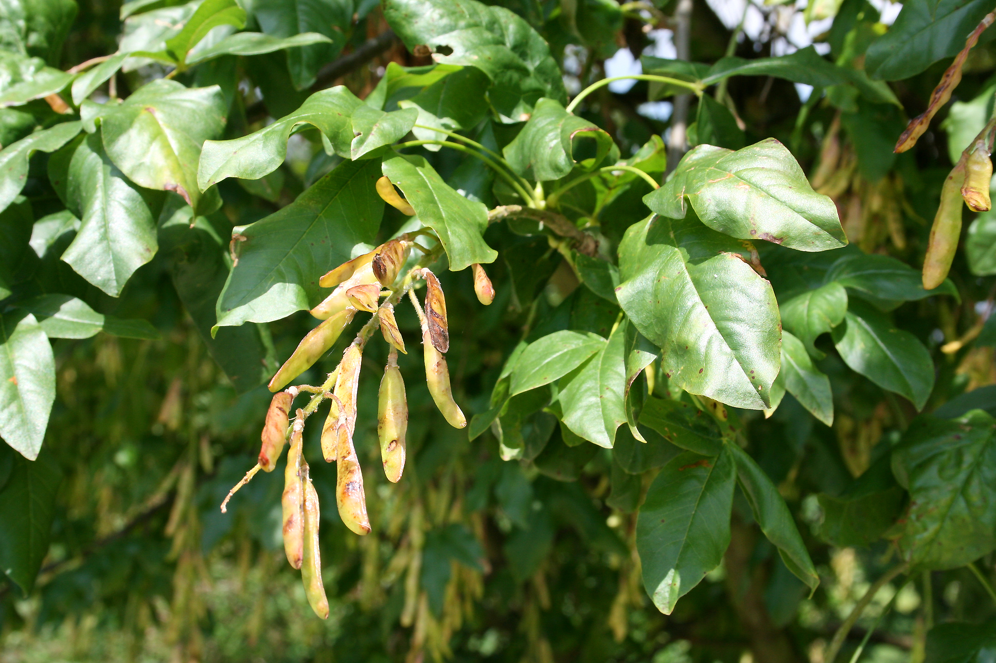 Feuilles et fruits du Cytise des Alpes (Laburnum alpinum). Position exacte : Meise (Belgique) – Jardin botanique National de Belgique.